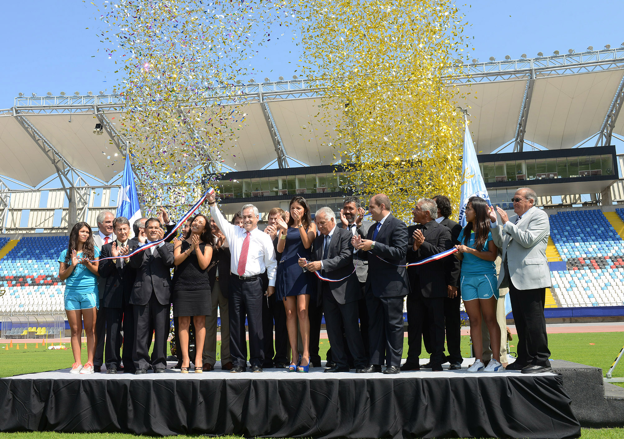 20-03-2013 Inauguración Estadio Regional Calvo y Bascuñán de Antofagasta